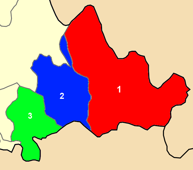 Χάρτης των ενοτήτων (και πρώην δήμων) από τις οποίες αποτελείται ο Δήμος Φαρκαδόνας